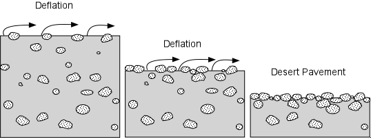 รูปที่ 1 แสดงลักษณะของ deflation ตะกอนละเอียดจะถูกพัดพาไปเรื่อยๆ โดยทิ้งตะกอยหยาบไว้ เมื่อเวลาผ่านไปตะกอนละเอียดถูกพัดพาไปมากขึ้น และตะกอบหยาบก็จะมากขึ้นจนเกิดการปิดทับตะกอนที่ละเอียด